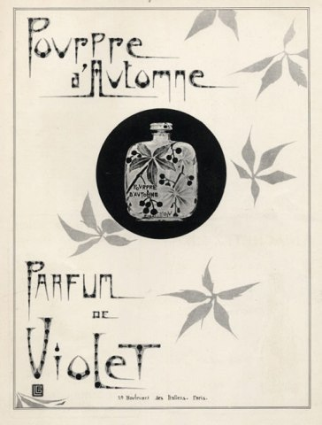 Publicité pour Pourpre d'Automne de chez Violet (1923) (in L'illustration). Le flacon et l'affiche ont été conçus par Lucien Gaillard.